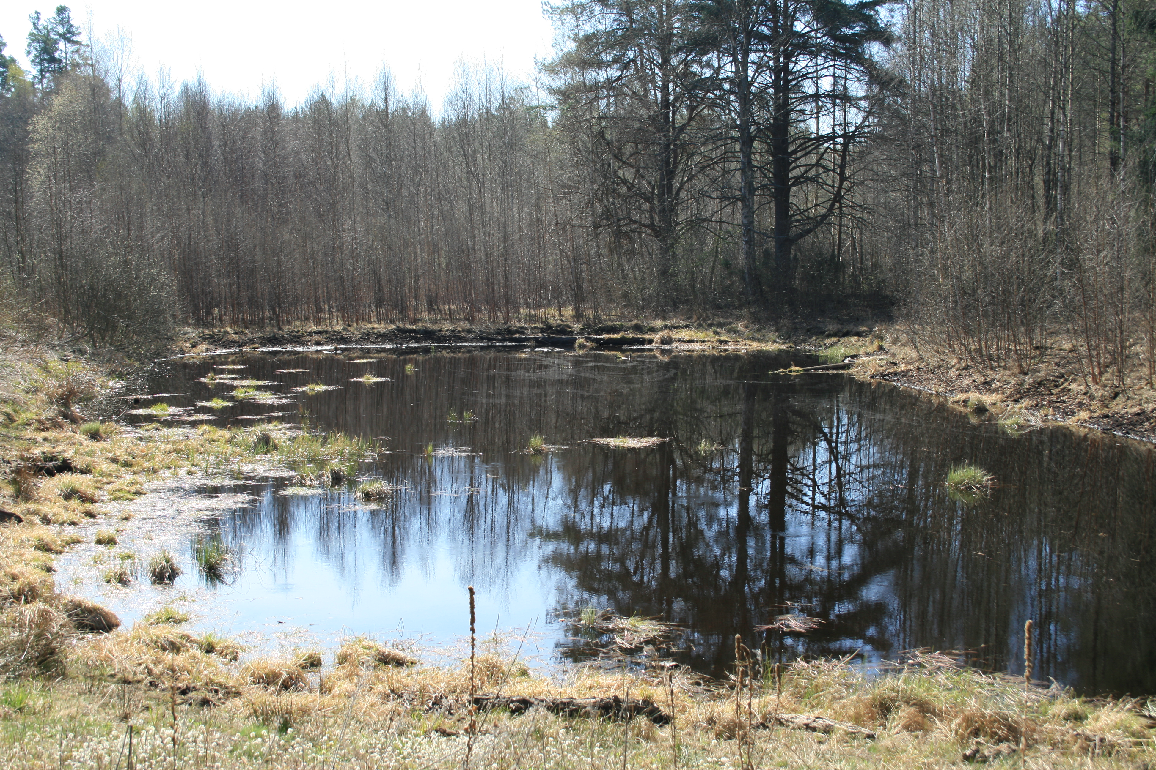 Kučiuliškės draustinis, Lithuania